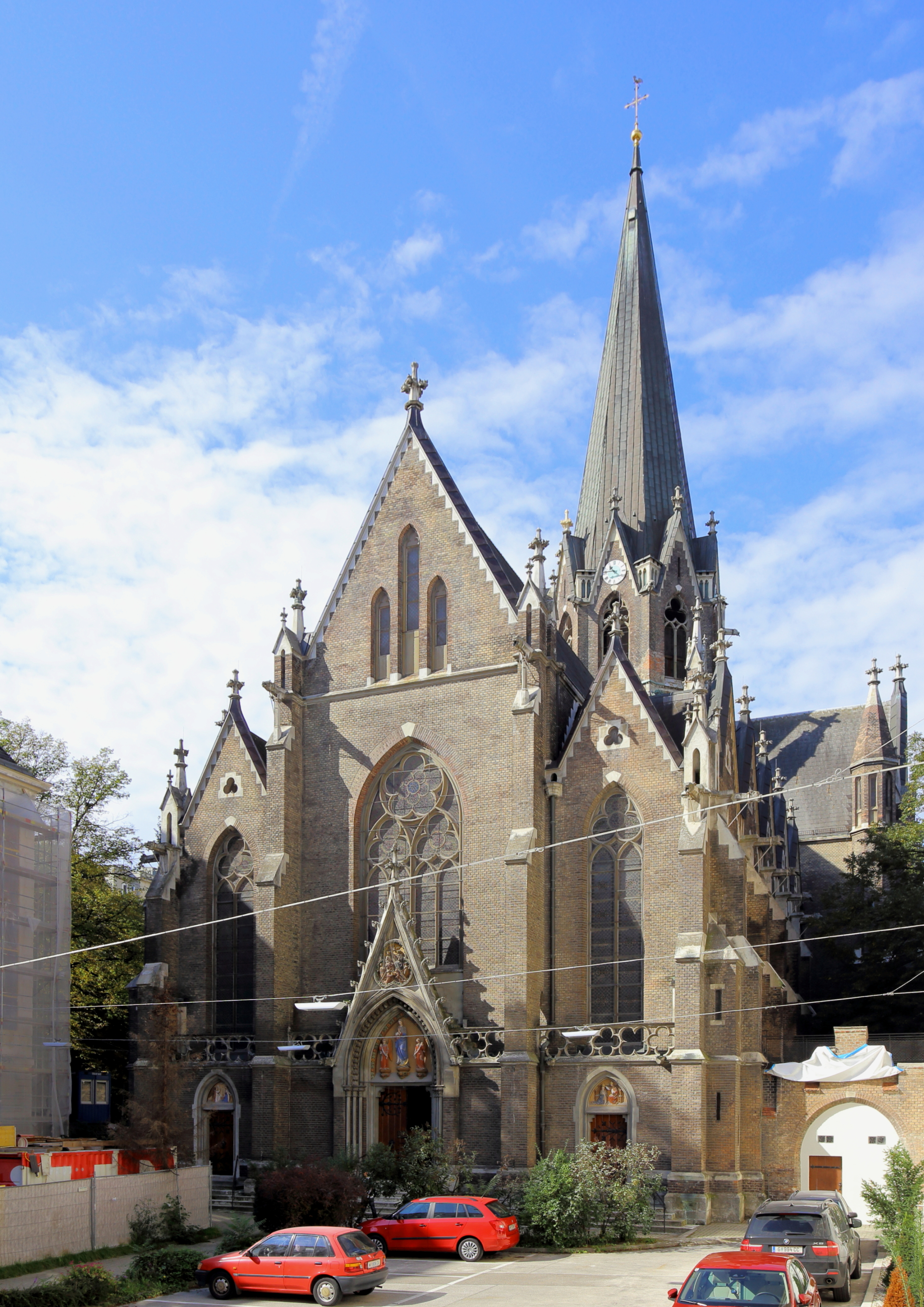 Lazaristenkirche im 7. Wiener Gemeindebezirk Neubau. Die Lazaristenkirche wurde als Ordenskirche für die 1853 nach Österreich berufenen Lazaristen nach Plänen des Architekten Friedrich von Schmidt von 1860 bis 1862 errichtet.